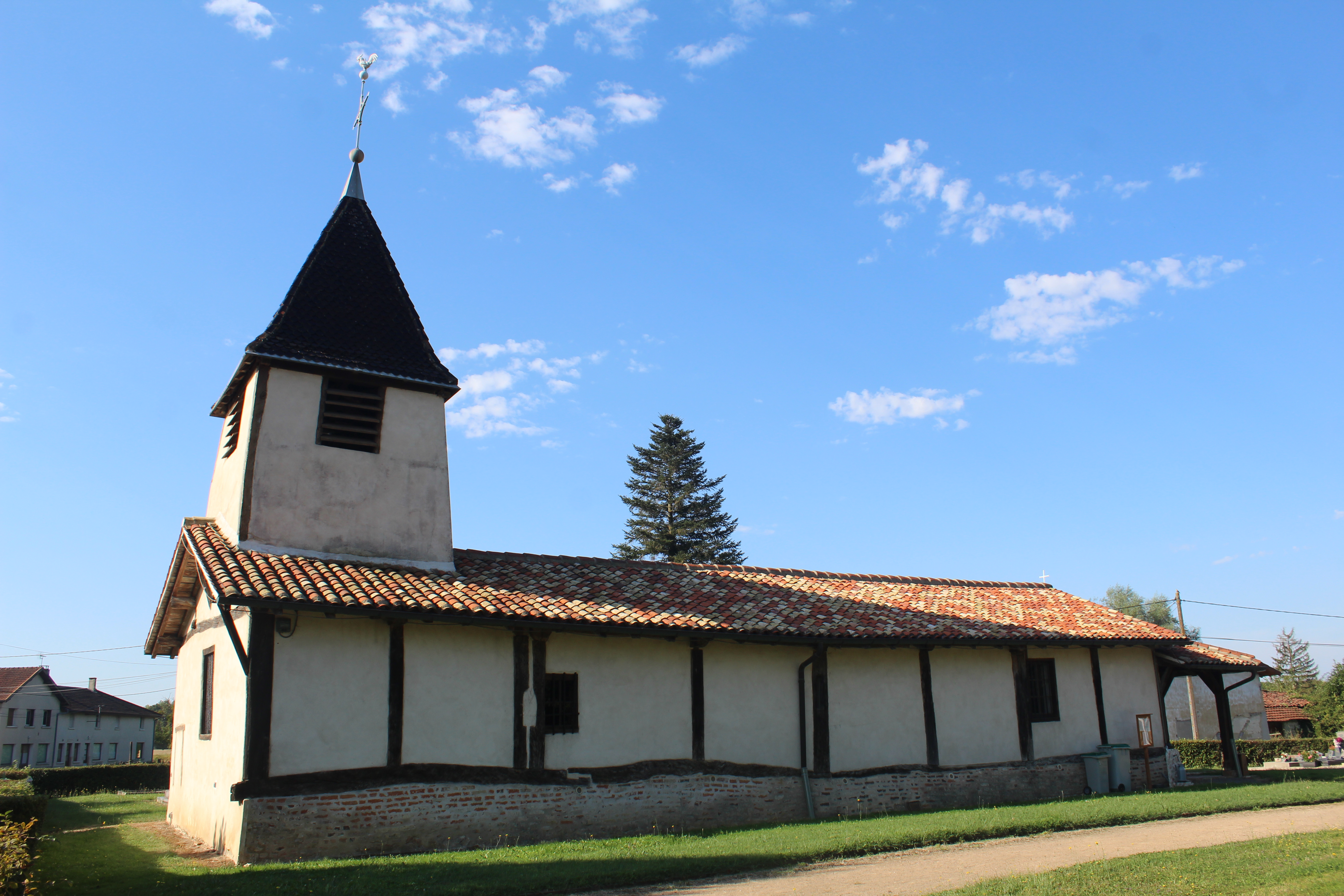 Église de Saint-Sulpice dans l'Ain.